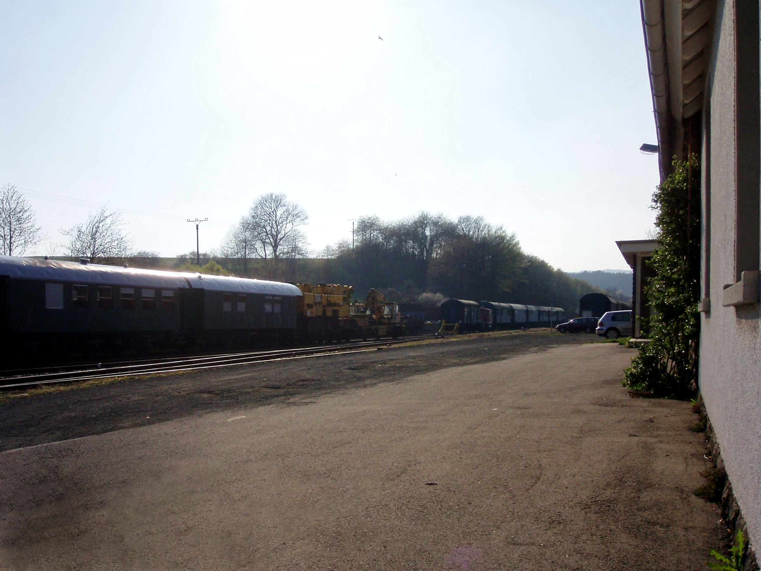 Alte Waggons am Bahnhof in Schwarzerden (Freisen)